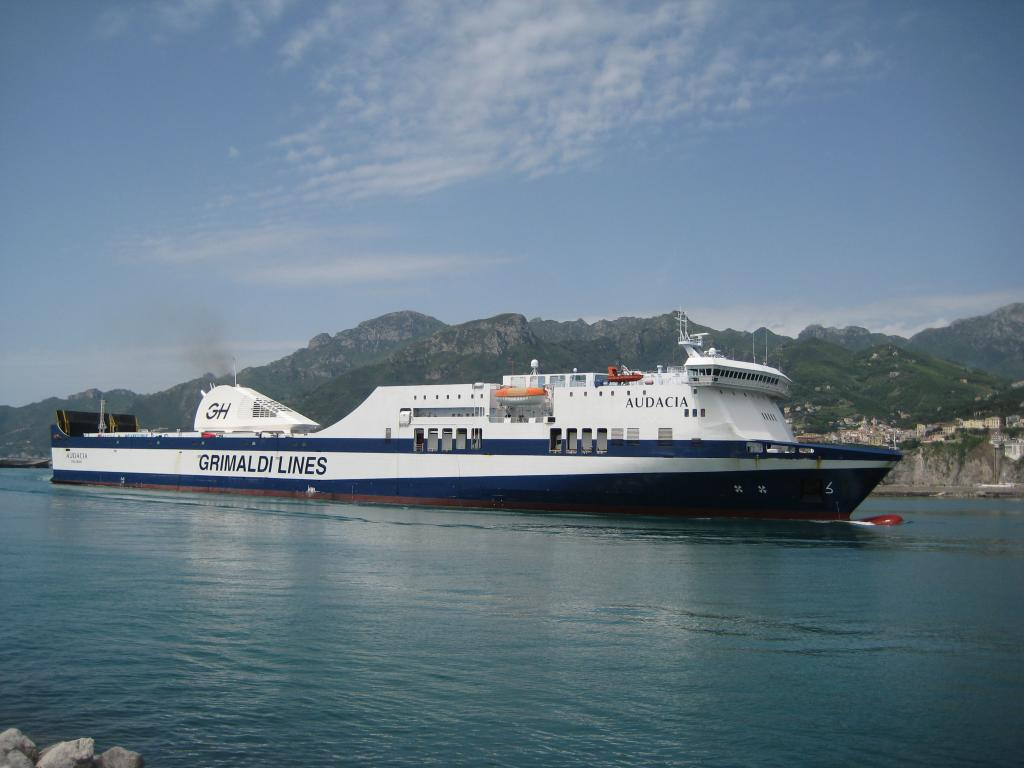 Una Grimaldi Lines mentre entra nel porto di Salerno